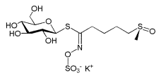 Glucoraphanin structure.